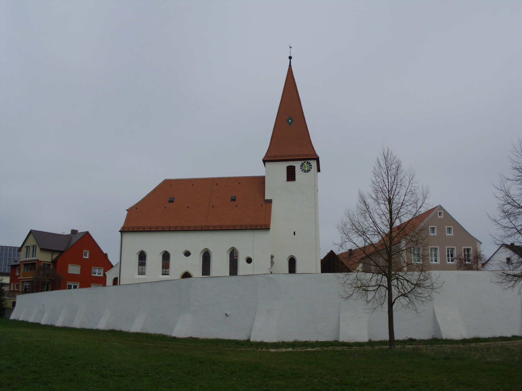 Trommetsheim, Gemeinde Alesheim im Landkreis Weißenburg-Gunzenhausen (Bayern), evang.-luth. Pfarrkirche St. Emmeram, Südansicht